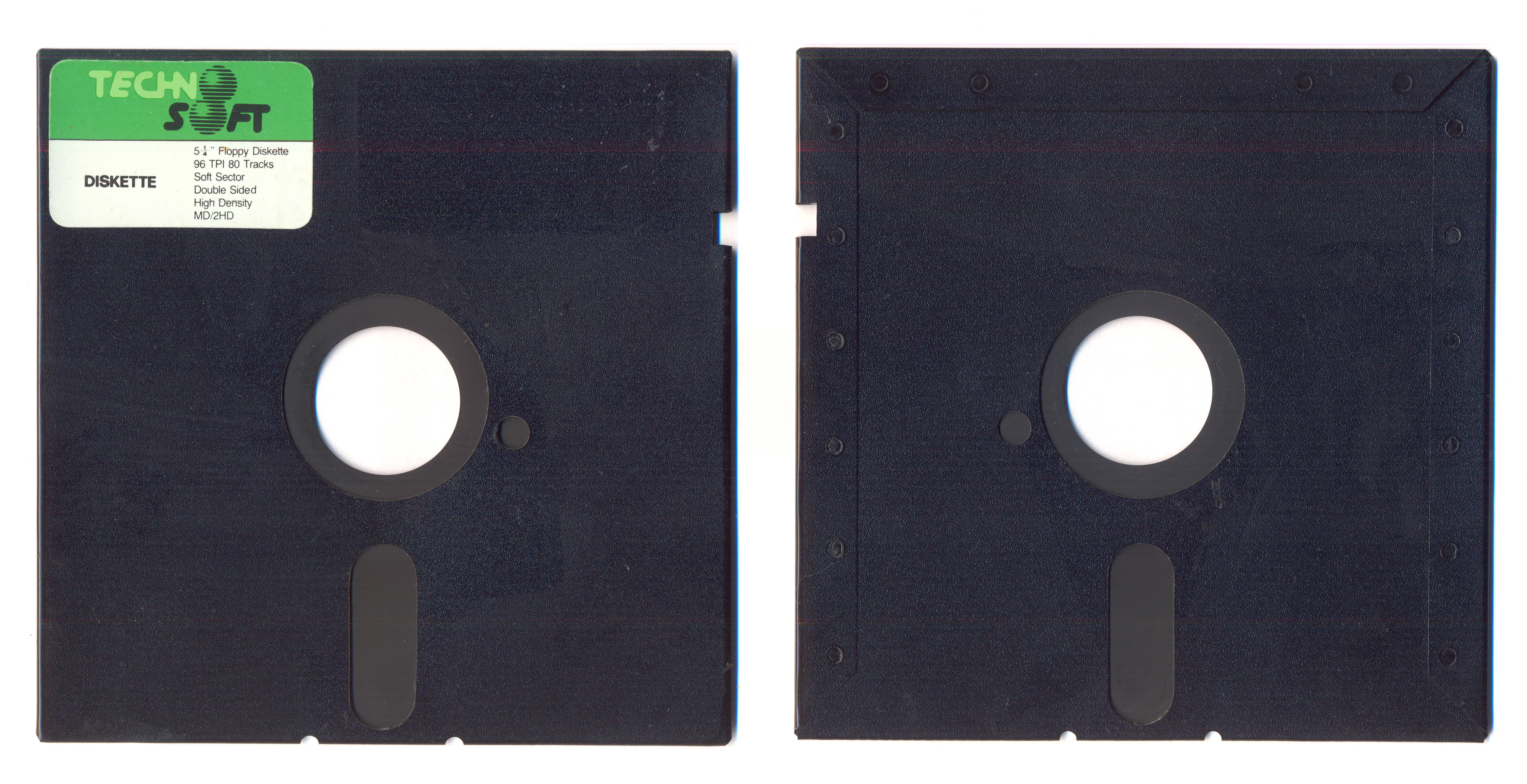 Внешний вид дискеты 5,25 дюйма с лицевой и оборотной сторон